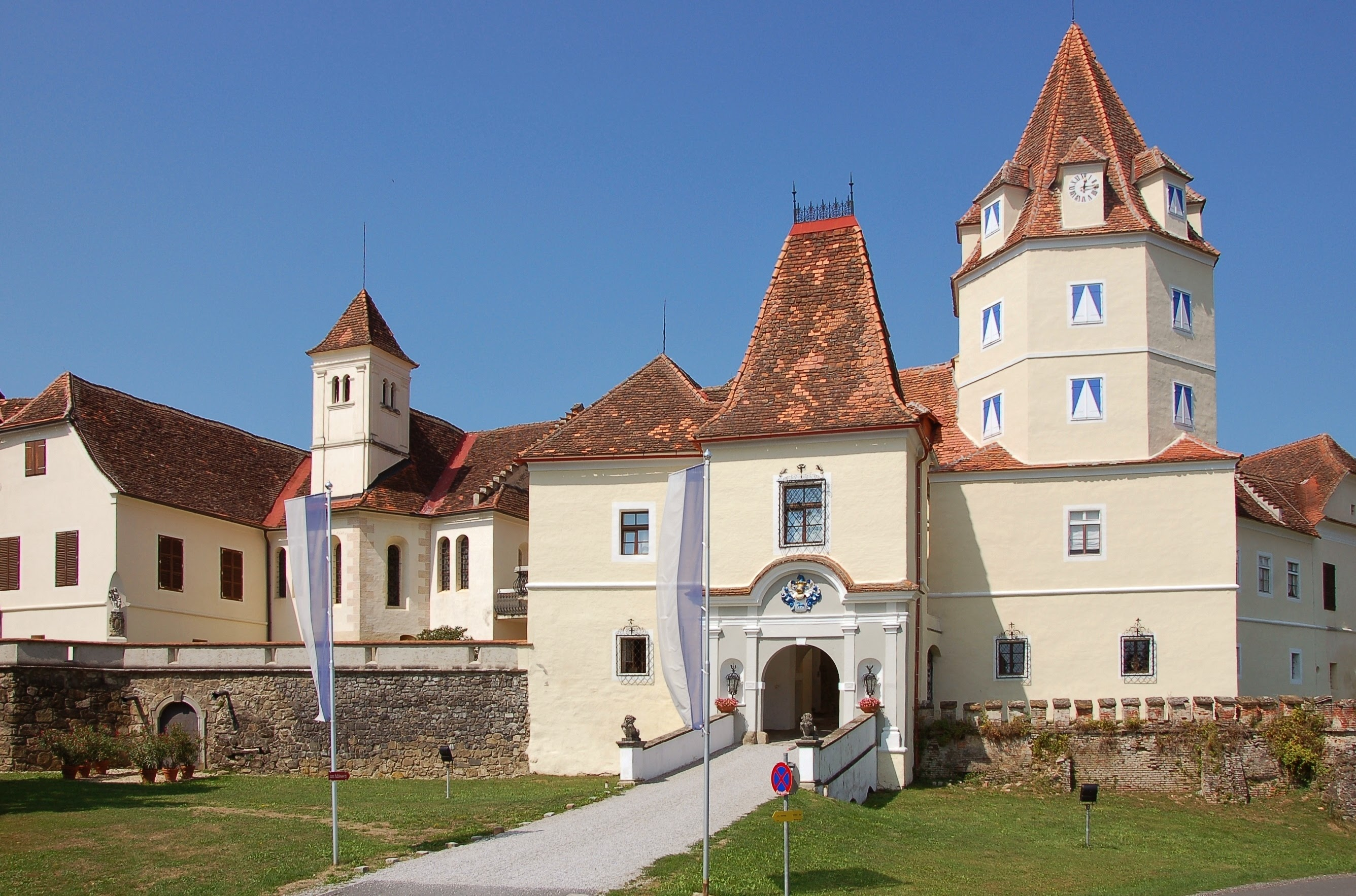 Schloss Kornberg, 13.Jh.,links: Kapelle, rechts:Torbau